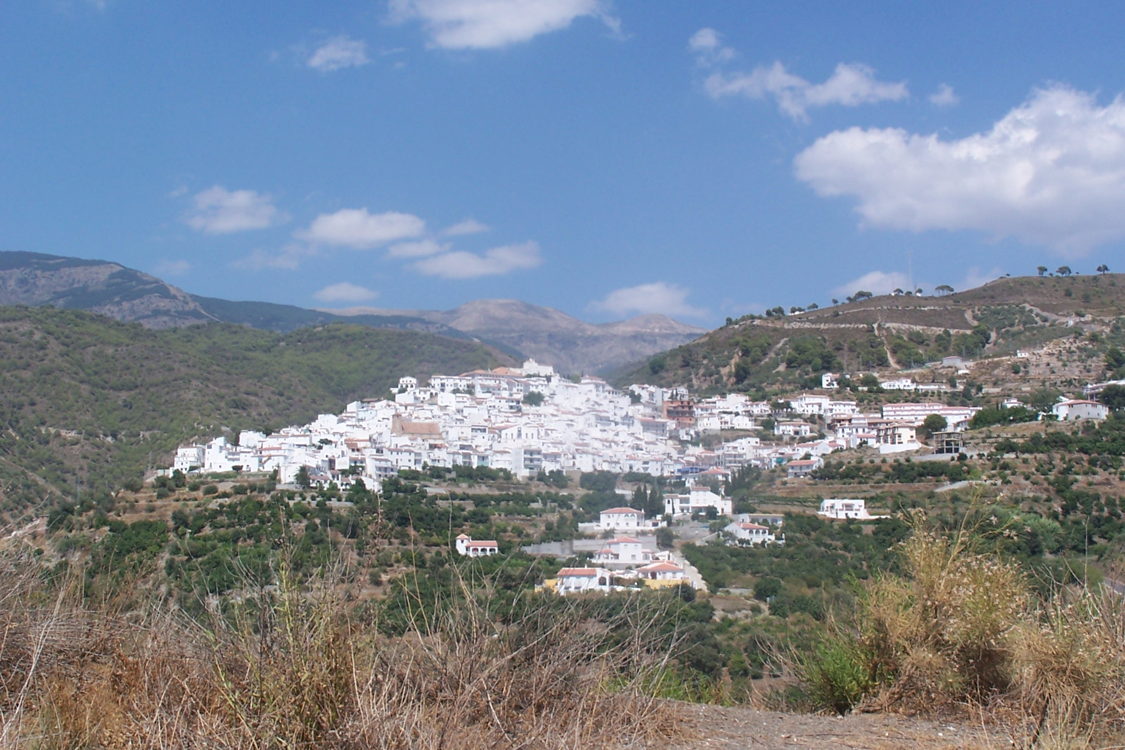 Henry Kelder